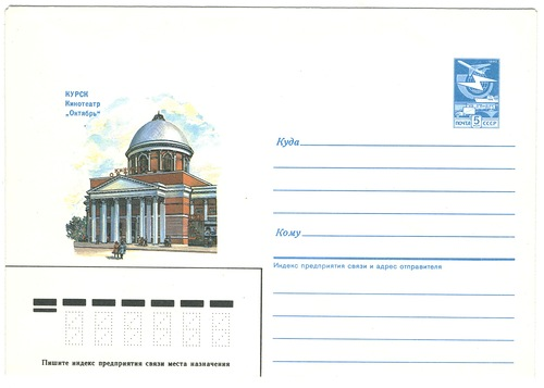 Почтовый конверт СССР — КУРСК. Кинотеатр "Октябрь"